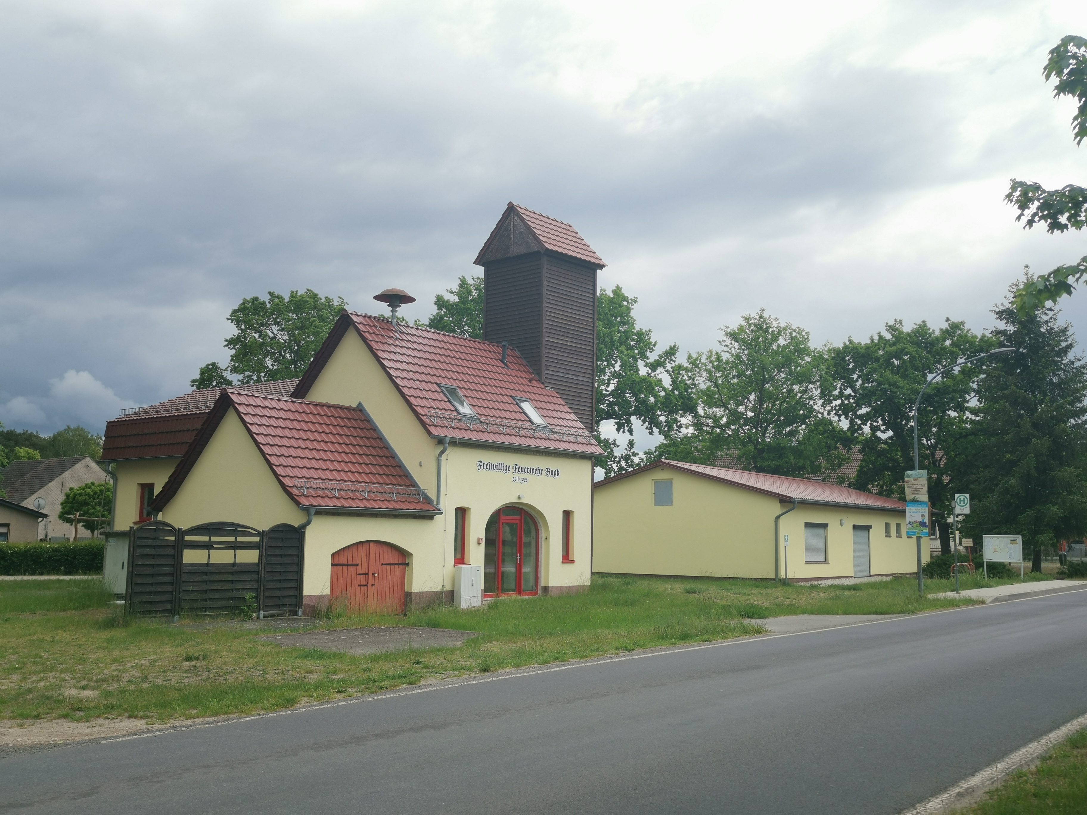 Freiwillige Feuerwehr in Bugk